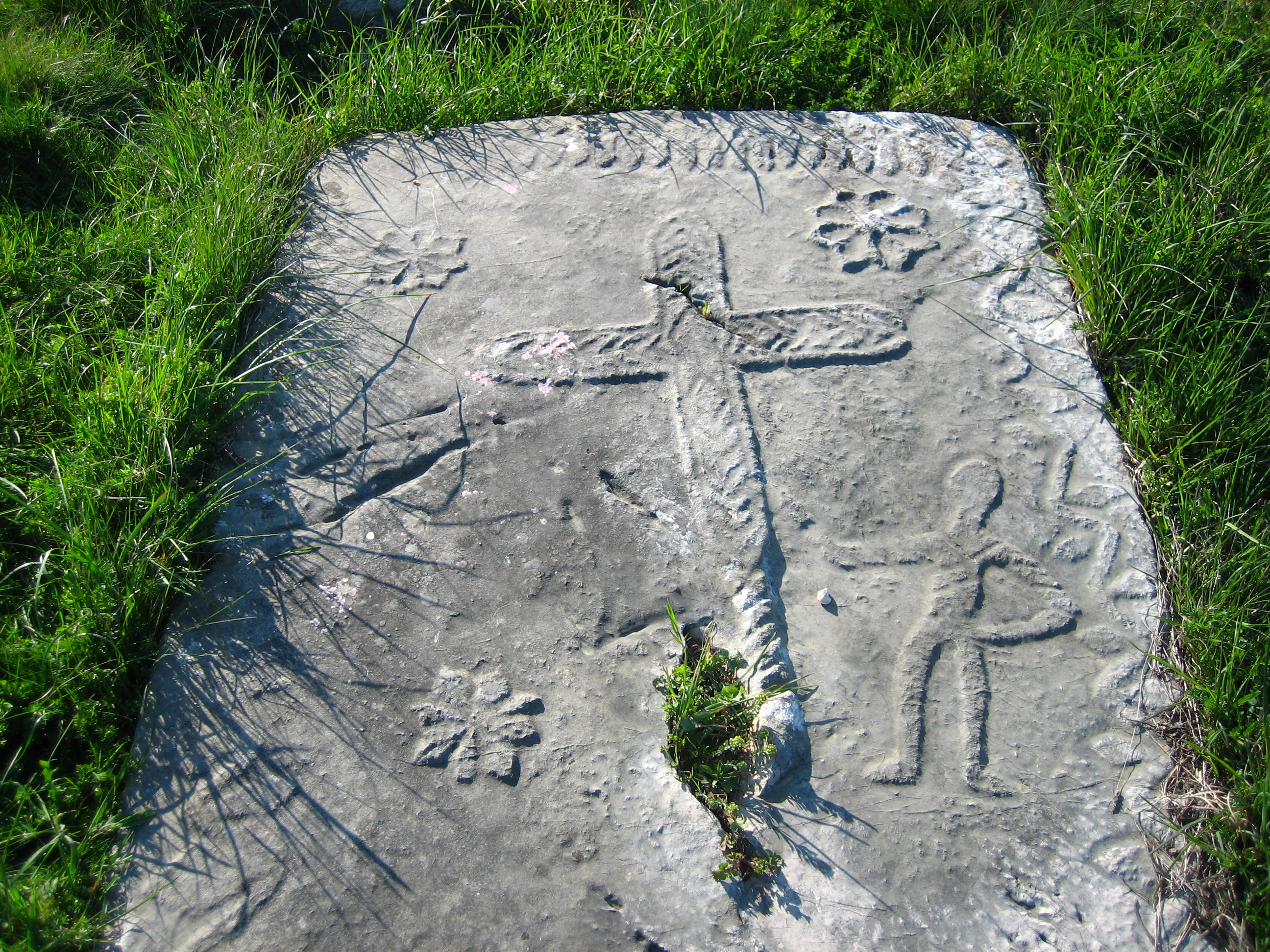 Pločasti stećak u Cisti Velikoj